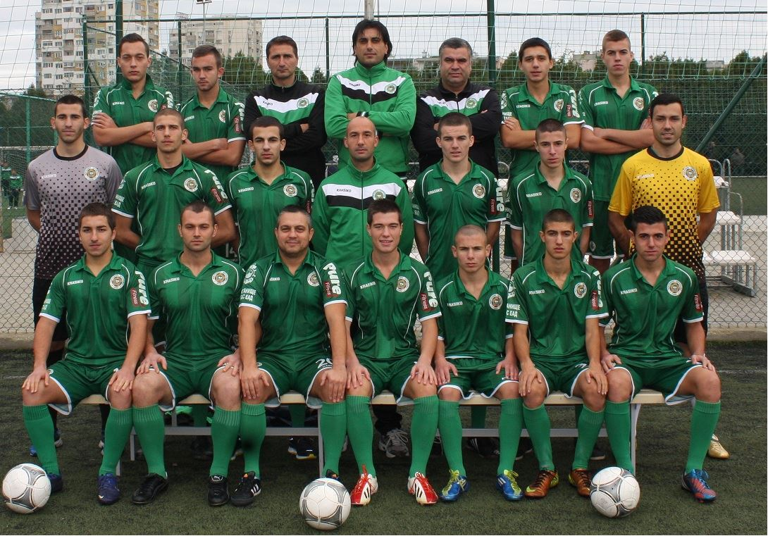 NeftochimicBurgas2014-2015, Club pic, football, Stoyan Nikolov, Ivailo Neiychev, Kostadin Djambazov